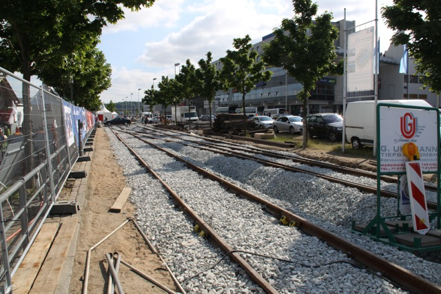 Boellhornkai Kiel